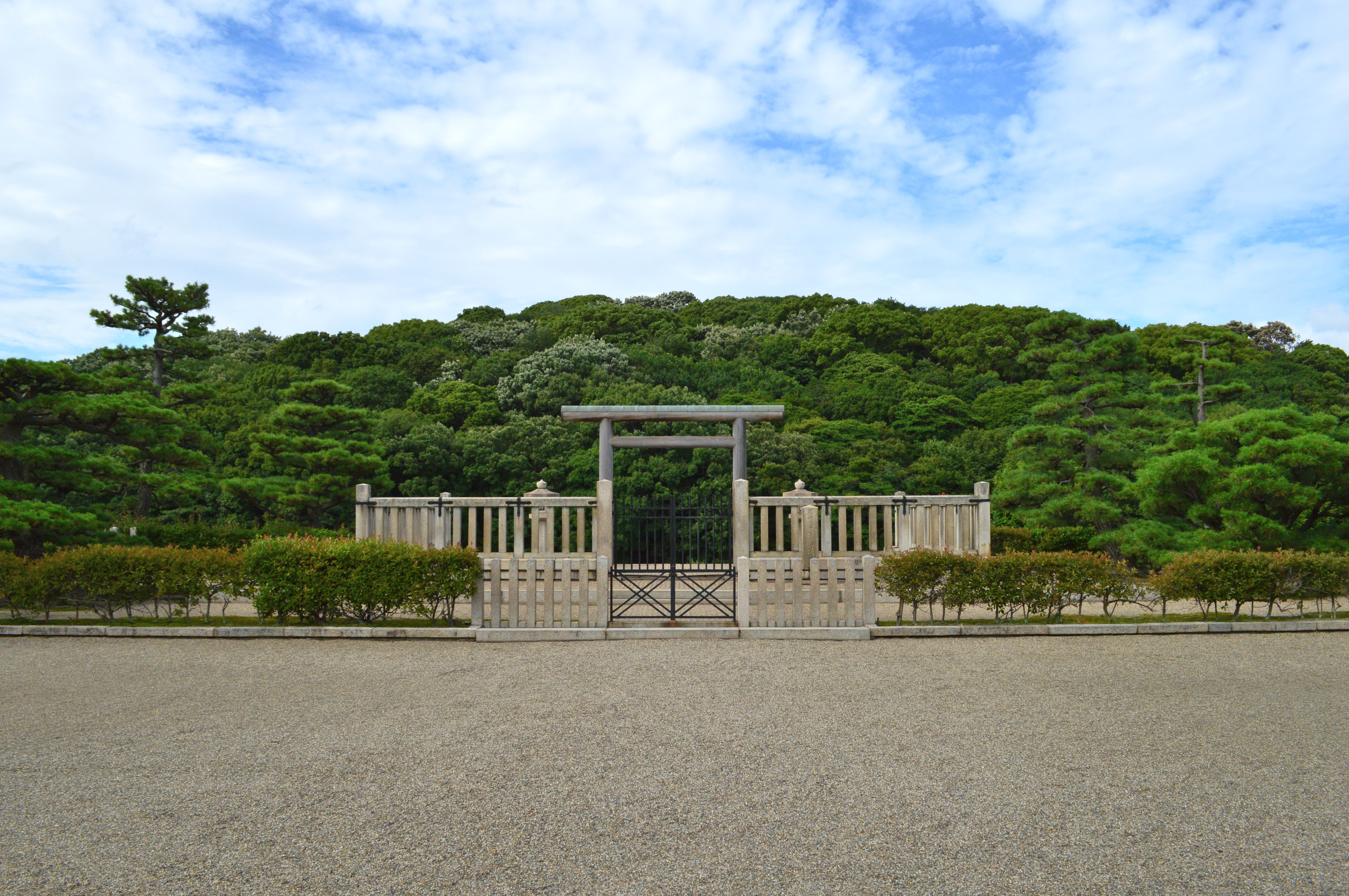 上石津ミサンザイ古墳 履中天皇百舌鳥耳原南陵拝所